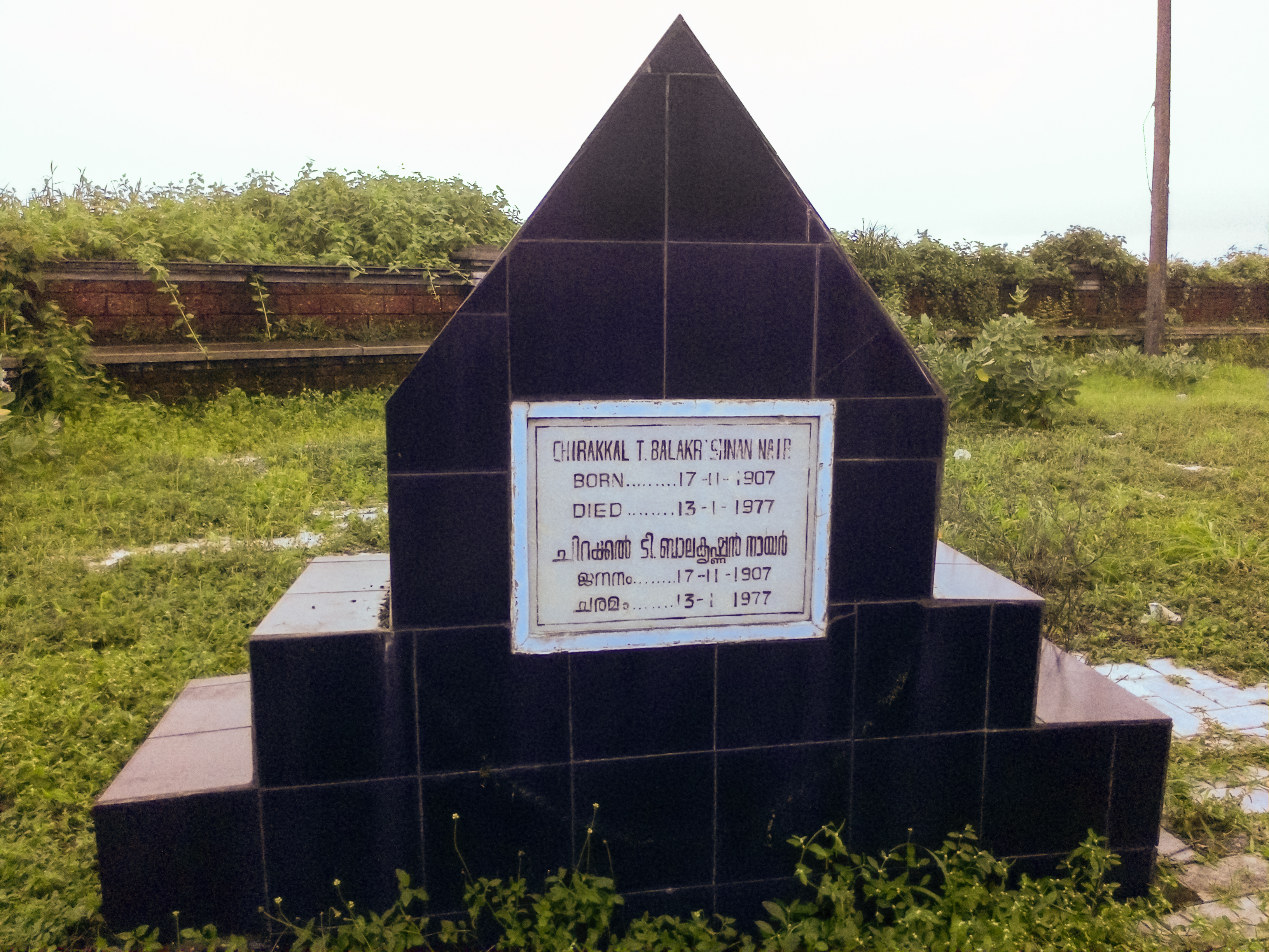 ചിറക്കൽ ടി ബാലകൃഷ്ണൻ നായരുടെ ശവകുടീരം,പയ്യാമ്പലം,കണ്ണൂർ